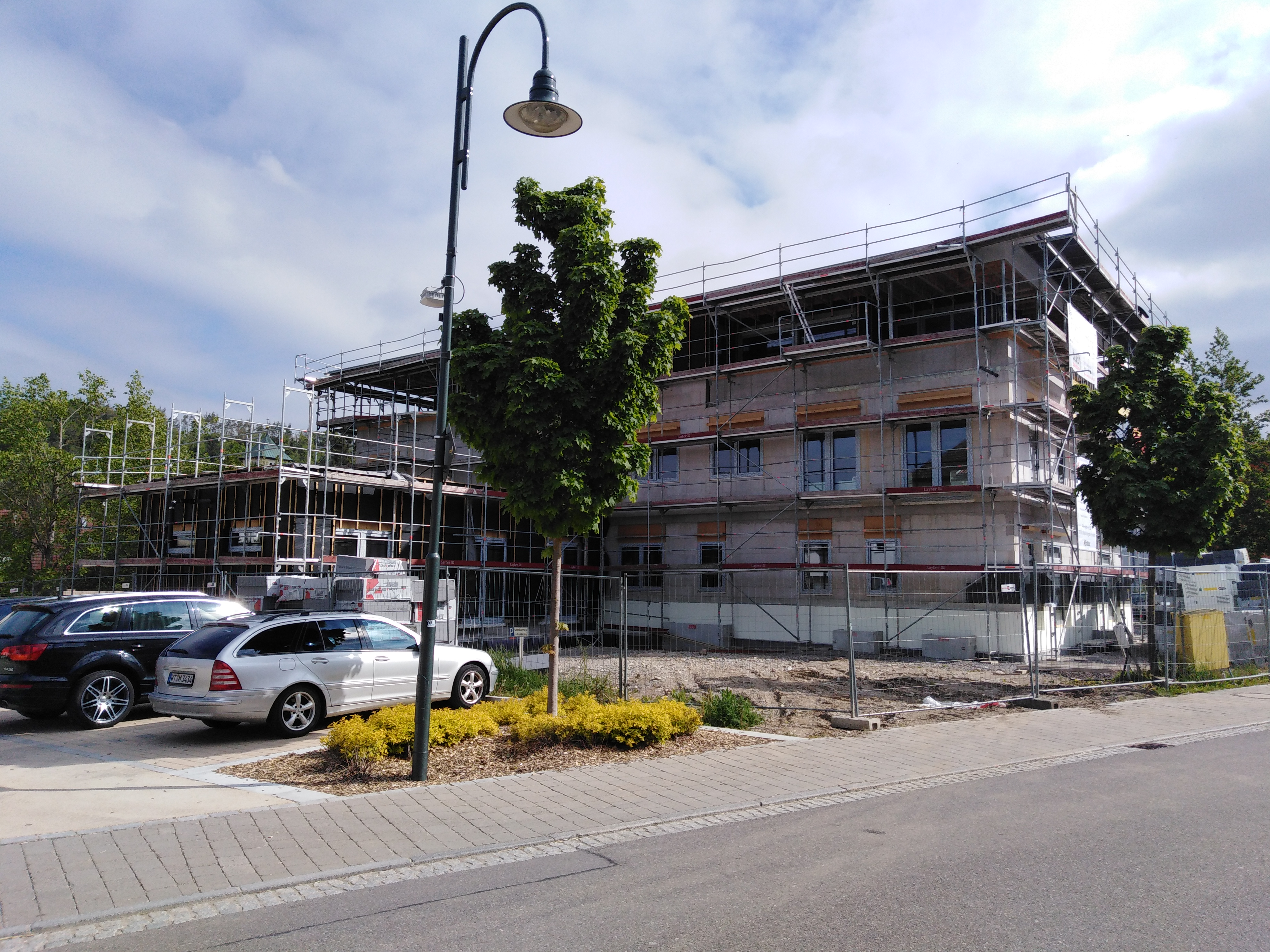 Wutöschingen, Gesamtgemeinde im Landkreis Waldshut in Baden-Württemberg. Das Ärztehaus in der Ortschaftsmitte.